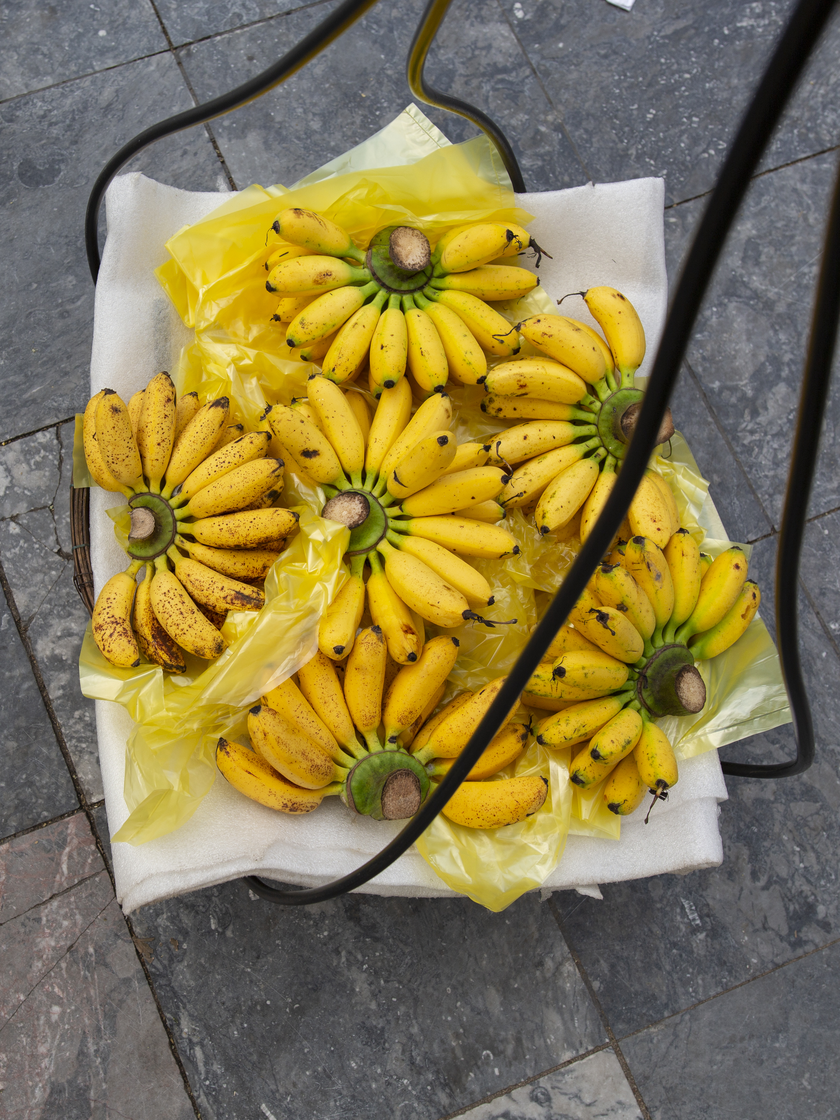 Vente de bananes au Vietnam.